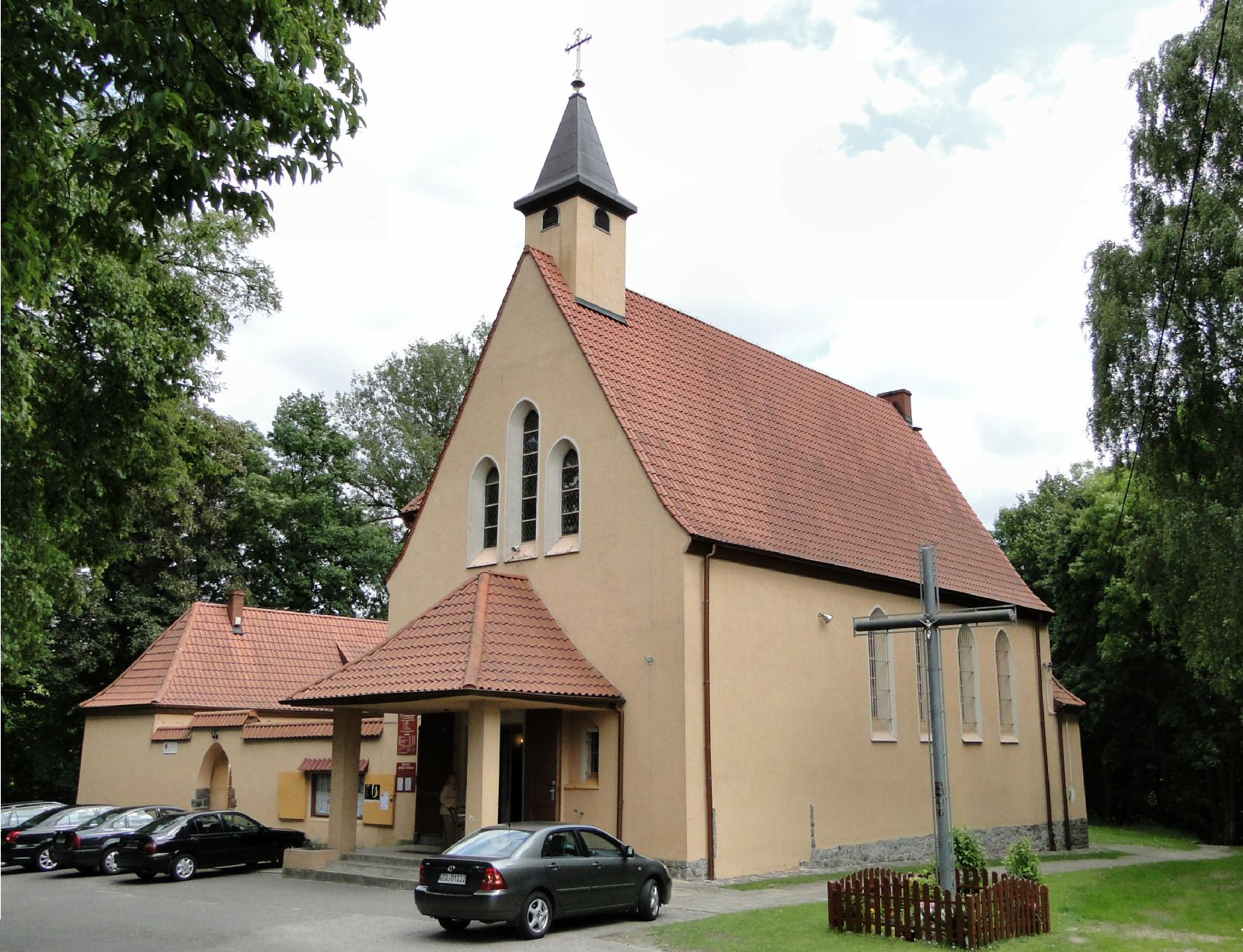 Kościół MB Ostrobramskiej przy ul. Słowiczej (Szczecin Żelechowa) (zabytek nr rejestr. 55)